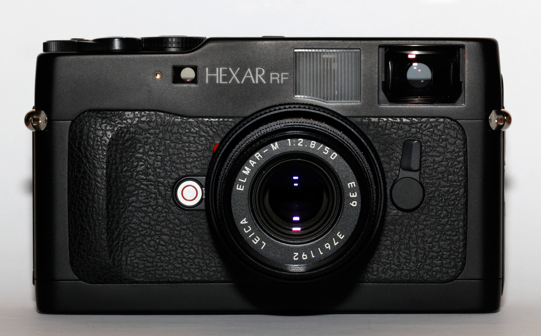 Konica Hexar RF mit Leica Elmar-M 2.8/50mm